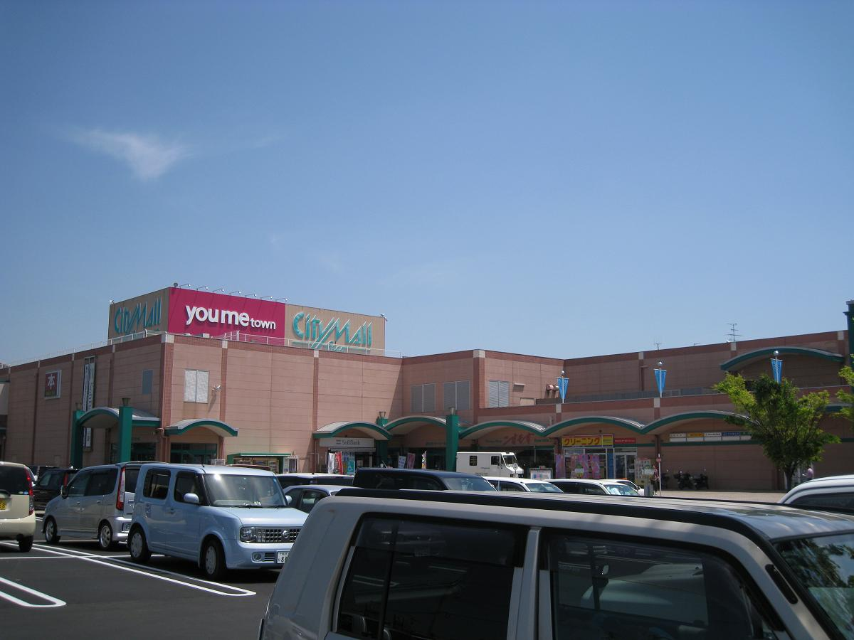 荒尾シティモール（核テナント・ゆめタウン側を撮影）